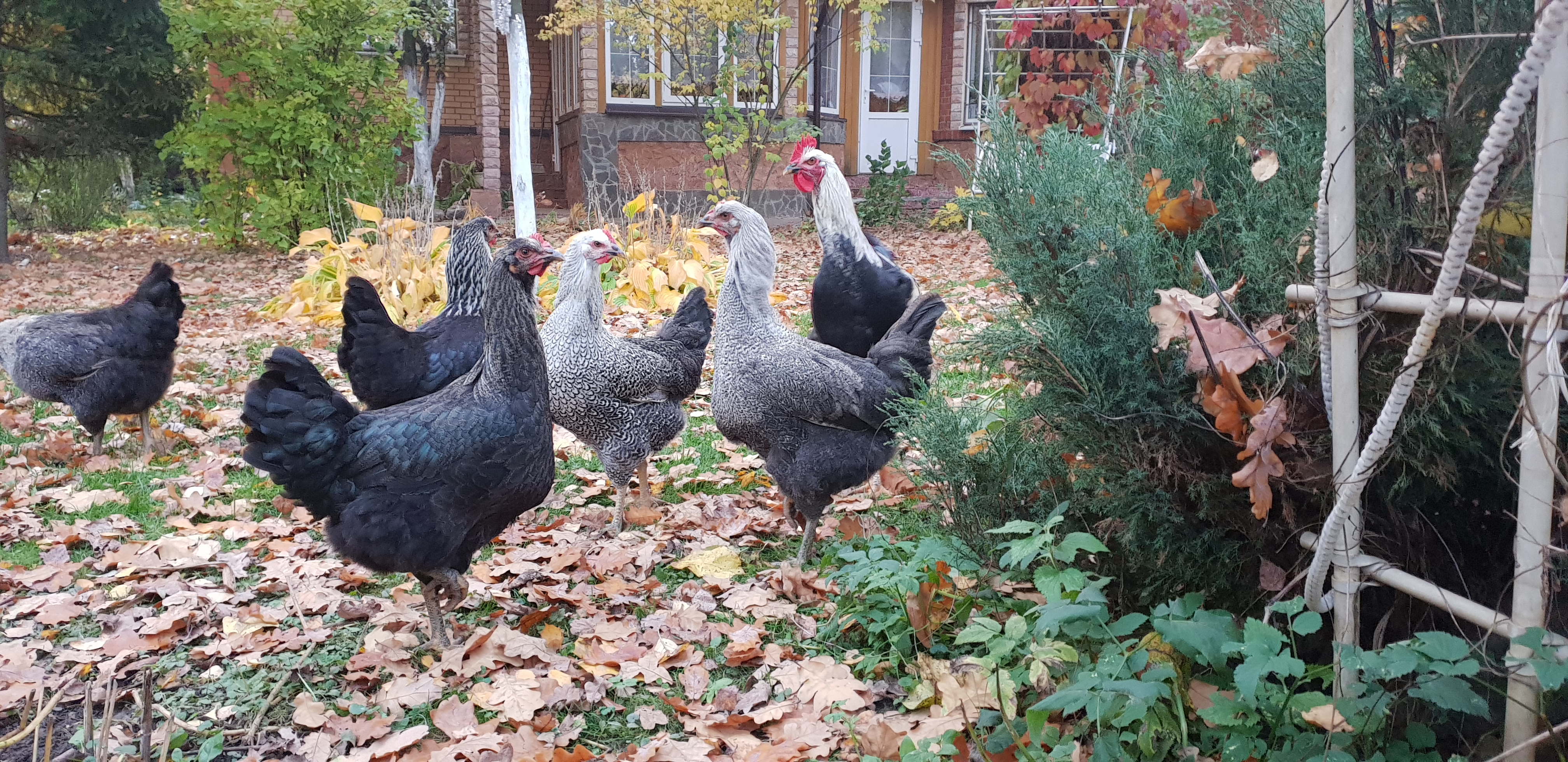 Группа молодых юрловских голосистых кур